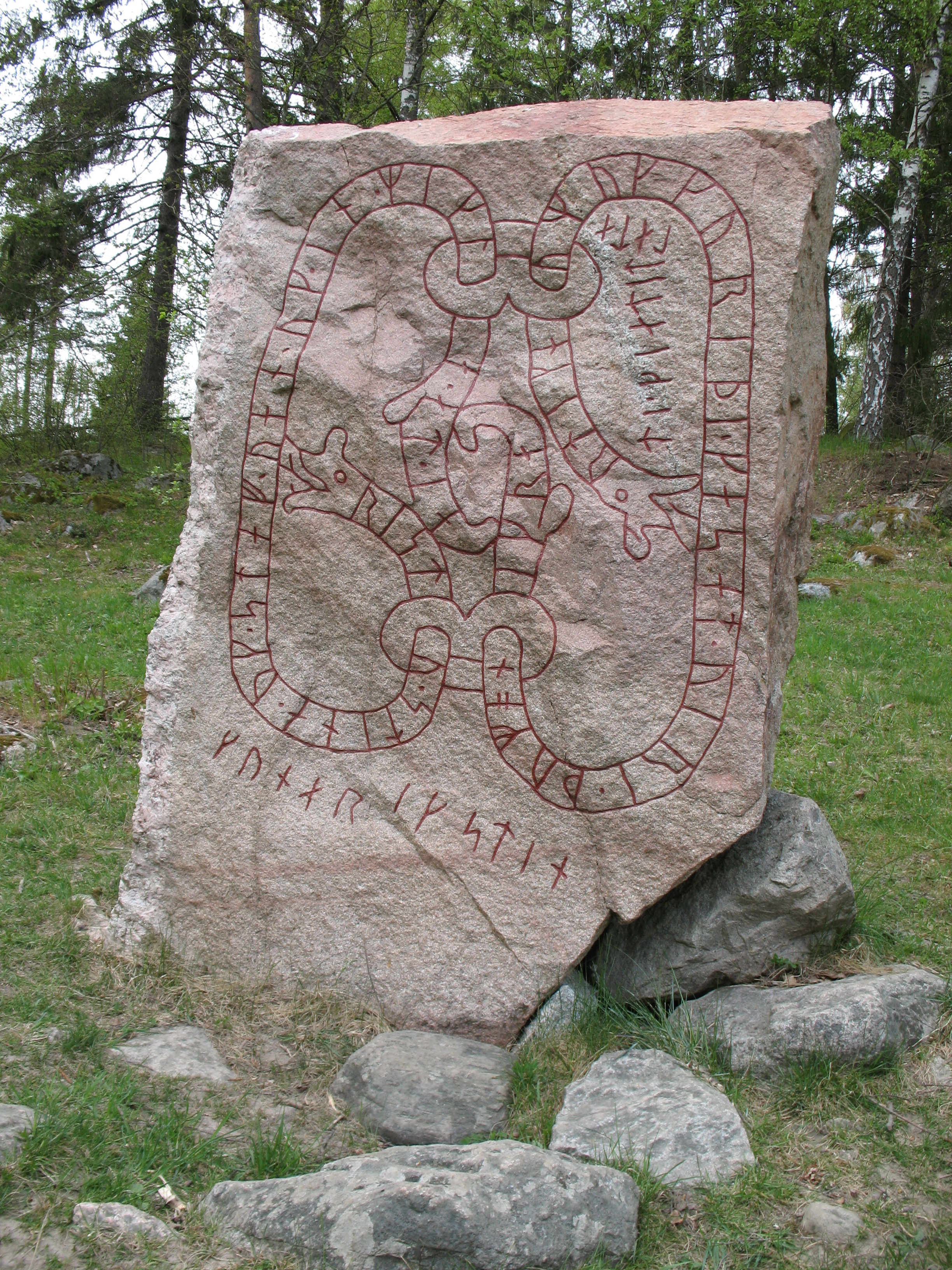 Runestone U 226 at Arkils tingstad, Vallentuna.